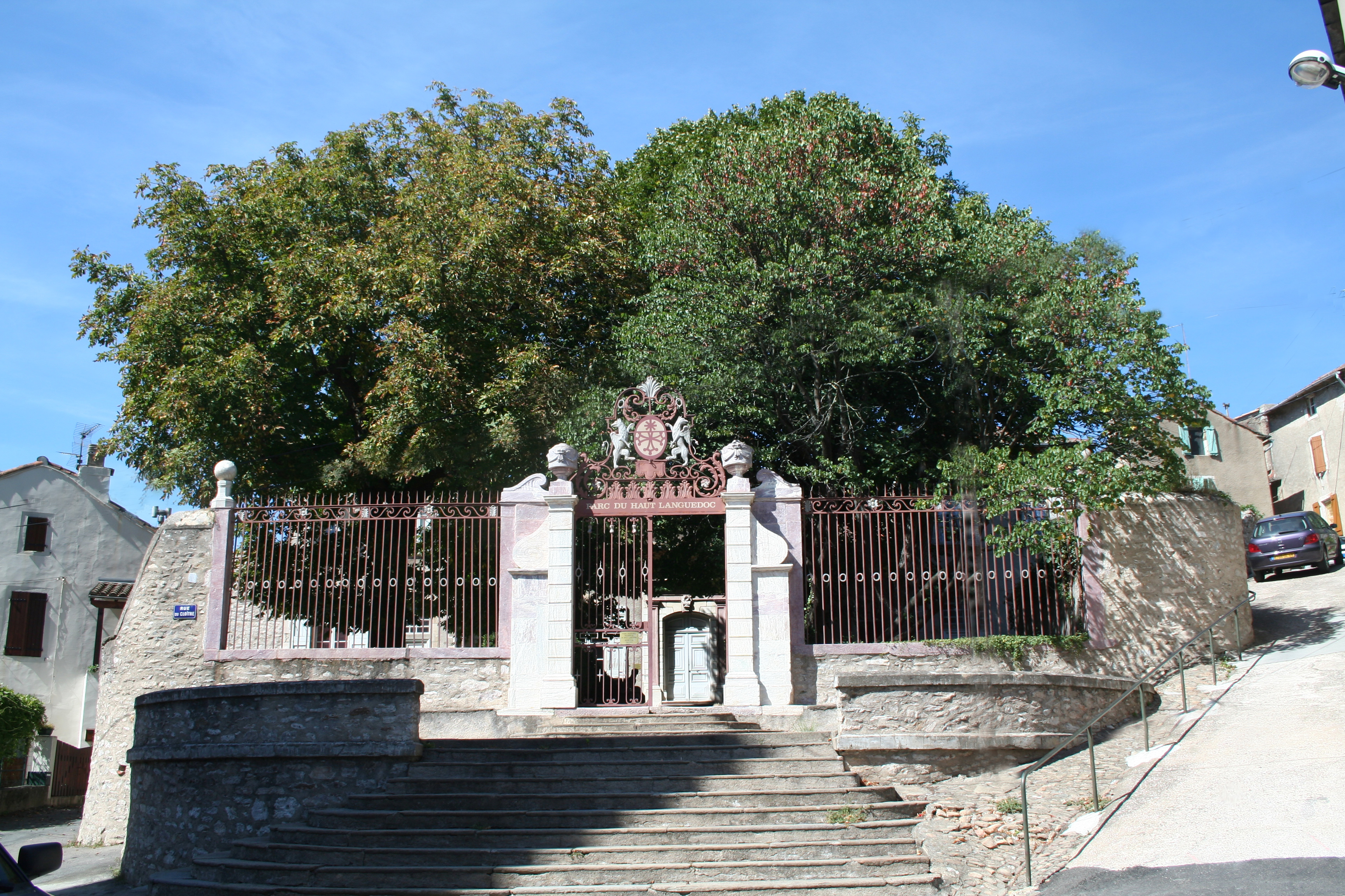 Saint-Pons-de-Thomières (Hérault) - Ancien évêché, siège actuel du Parc du Haut Languedoc et du tribunal.